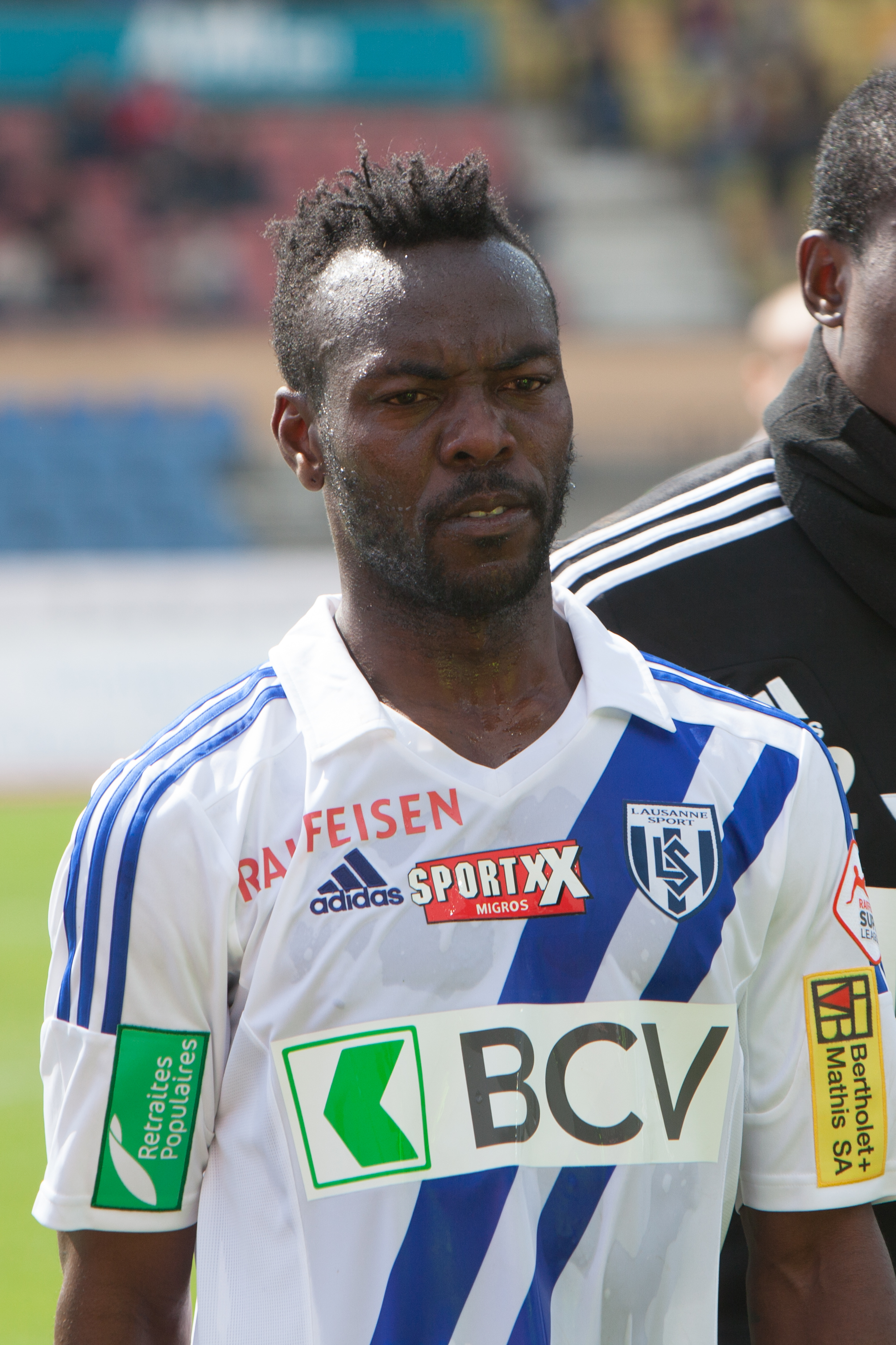 Lausanne Sport vs FC Sion - Avril 2014 - Pascal Feindouno